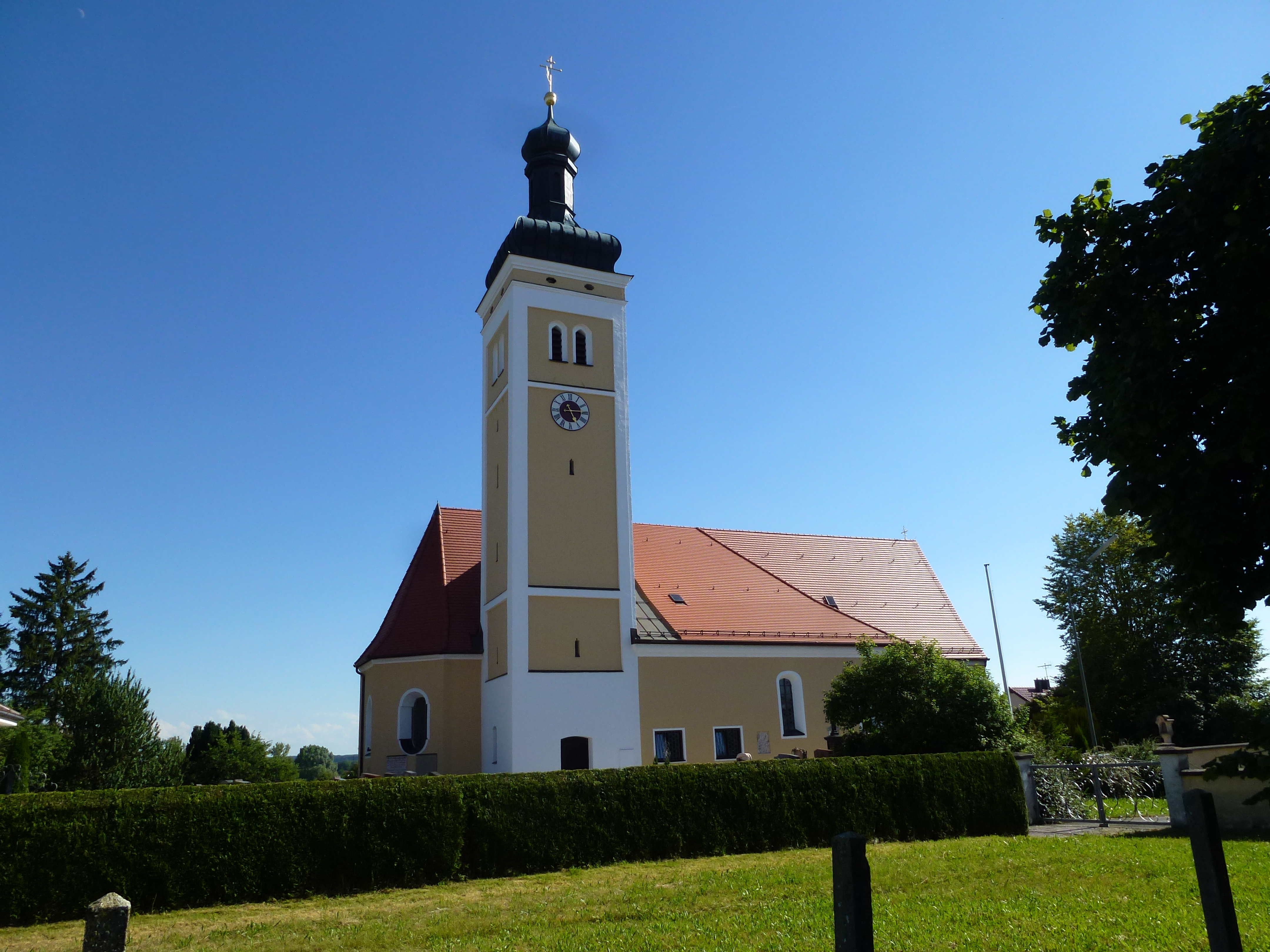 Egenhofen, Brucker Str. 1a: Katholische Pfarrkirche St. Leodegar, Ansicht von N